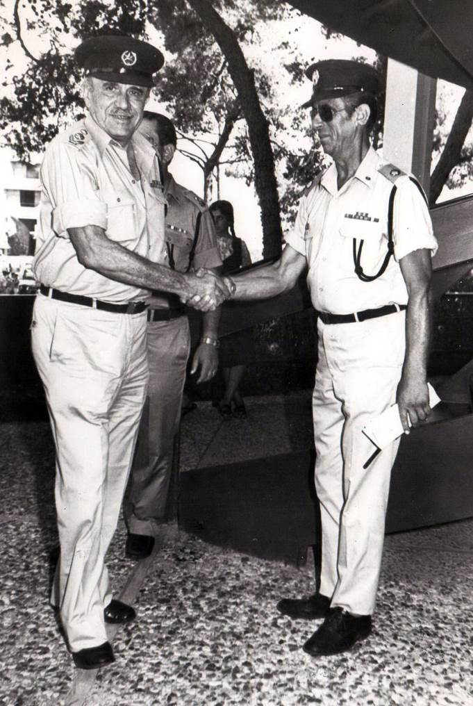 המפכ"ל חיים תבורי